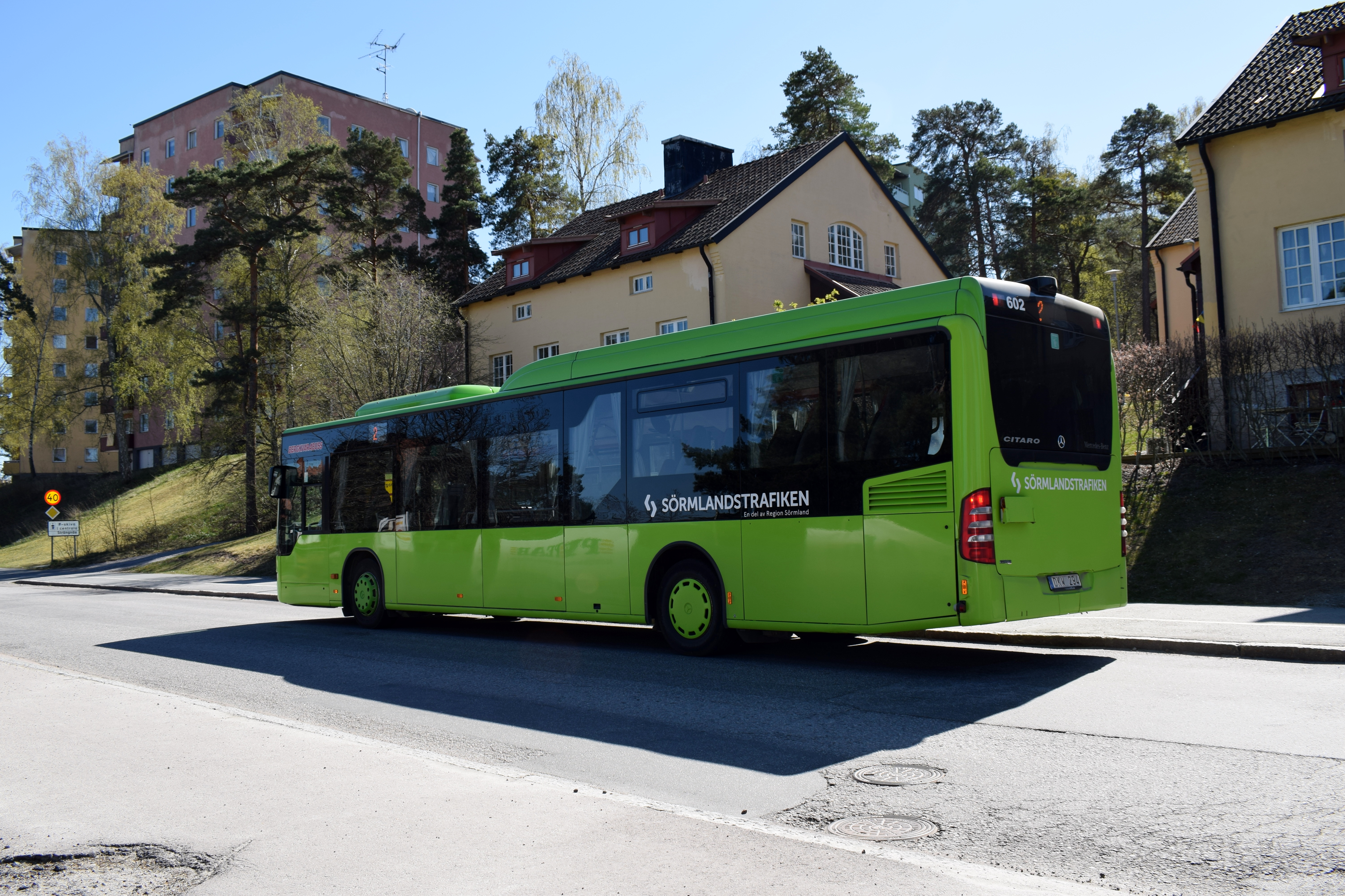 Busslinje 2 mot Dammen vid hållplatsen Eldsundsviken i Strängnäs.